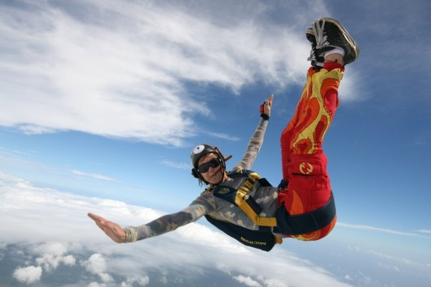 Una paracaidista en caida libre realizando la posicion "Death Dog" comprendida en la modalidad "Free Fly"